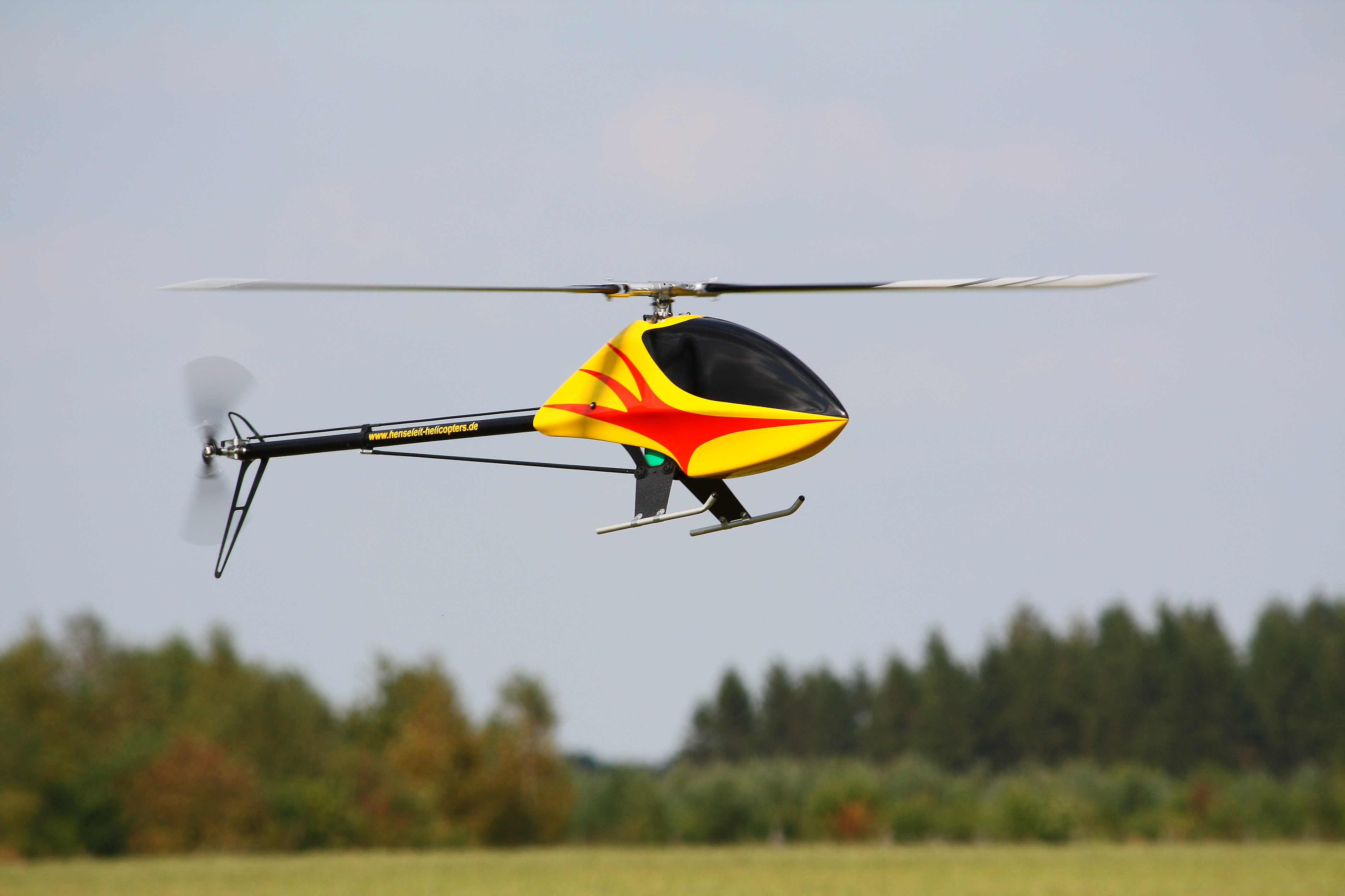 Schwebeflug eines TDR-Henseleit RC-Helikopters